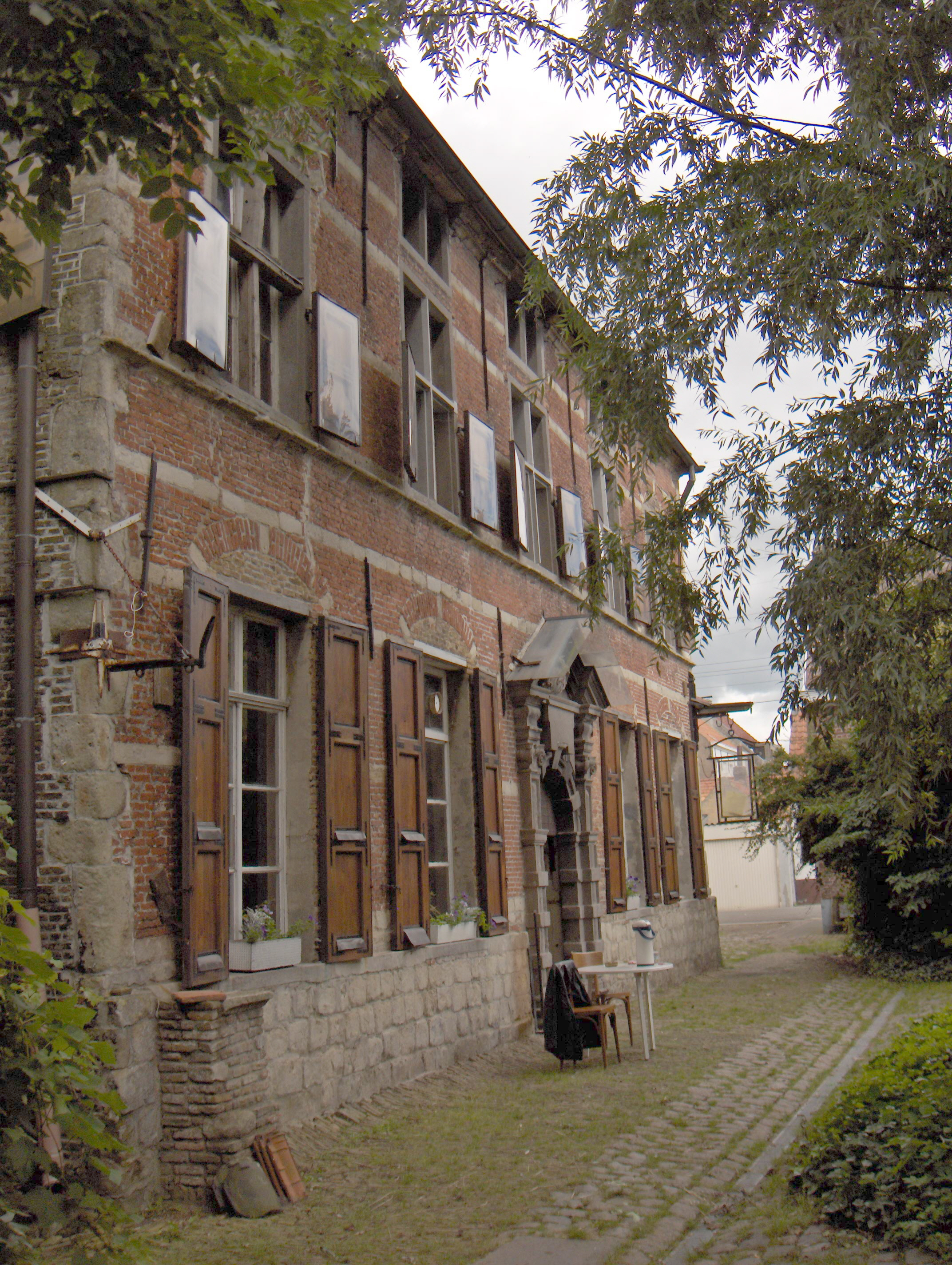 Bild: Doel (Belgien), Hooghuis (an der Hooghuisstraat) Fotograf: Friedrich Tellberg Datum: 7. August 2005